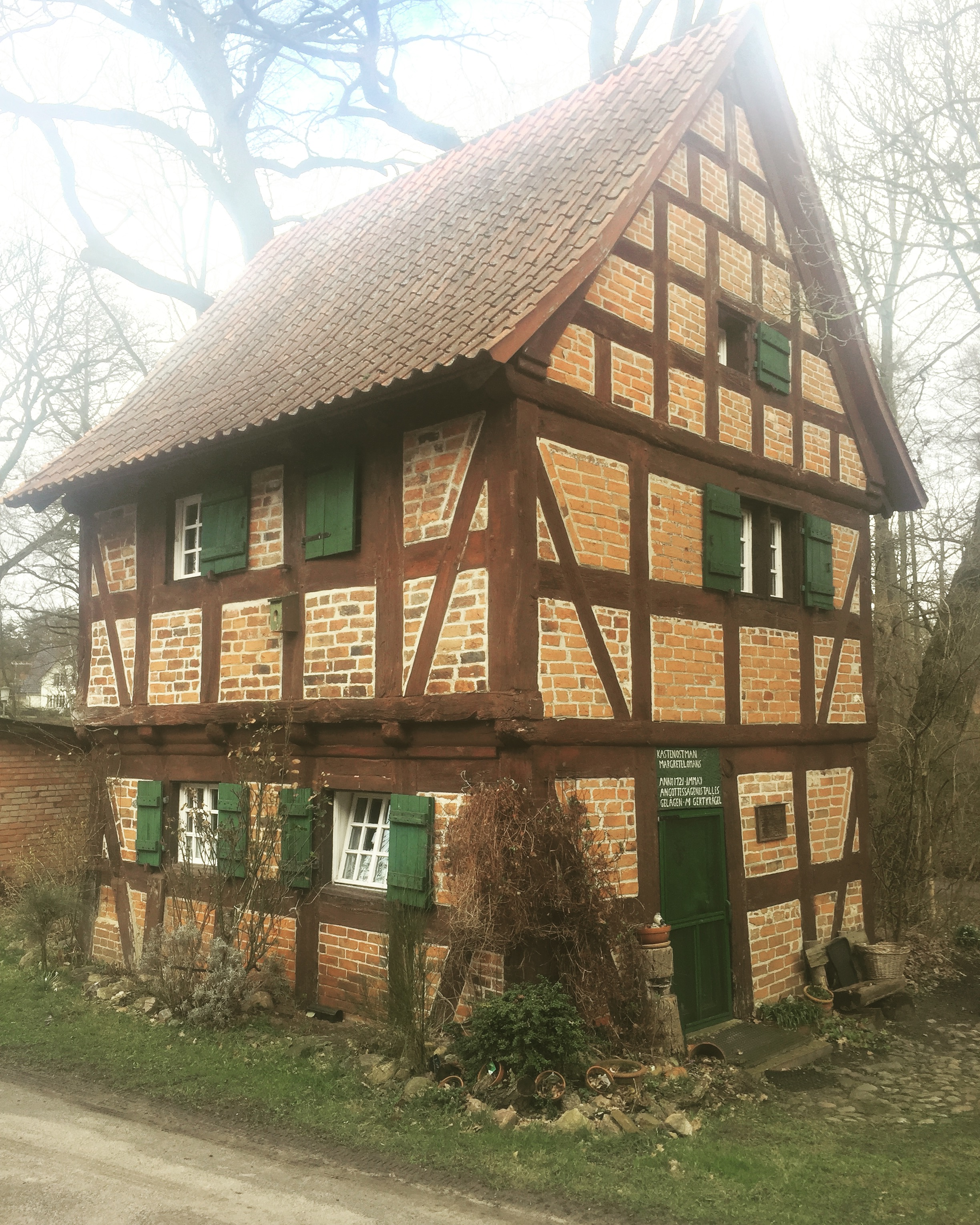 Fachwerkspeicher